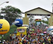 Pórtico do Alto do Moura - Caruaru, Pernambuco, Brasil.